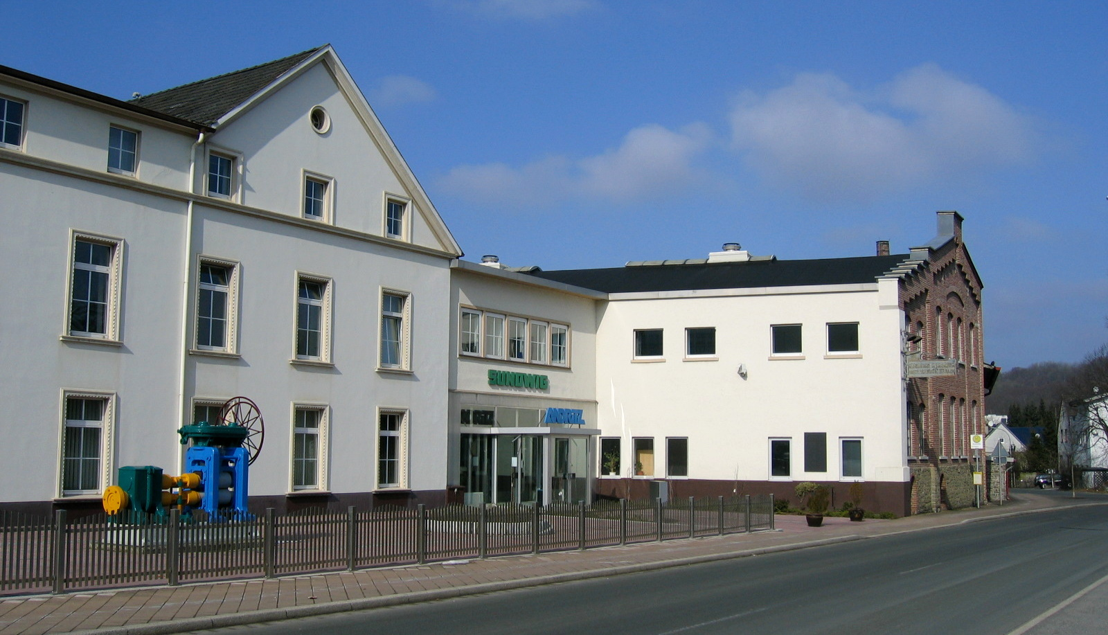 Description: Fabrikgebäude der Sundwig GmbH in Hemer Source: selbst fotografiert Date: 18. März 2006 Author: Bubo